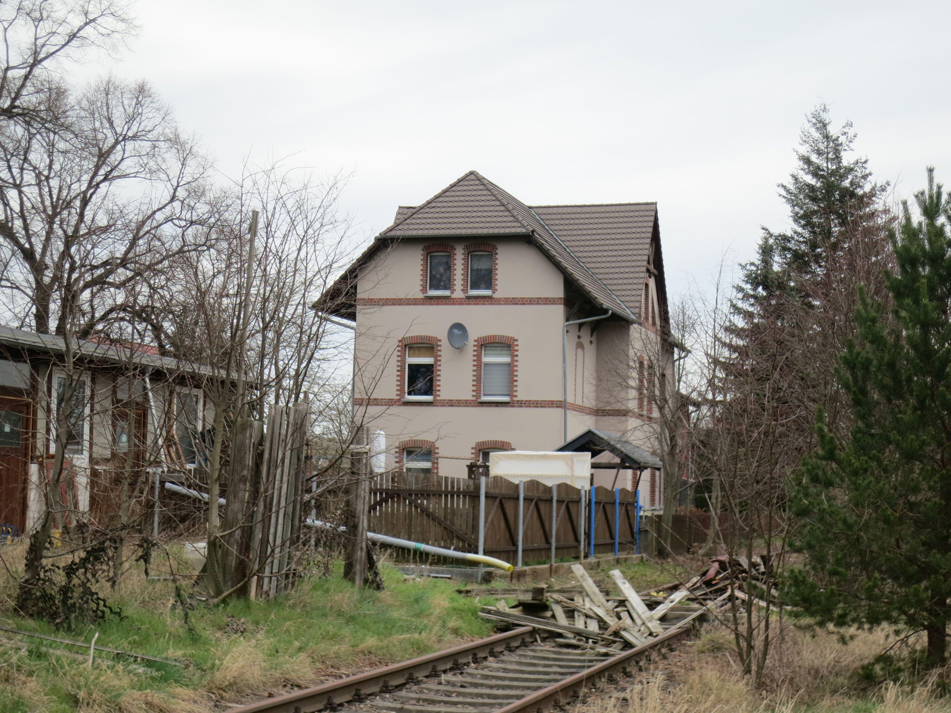 Der alte Bahnhof in Ziesar am nordöstlichen Stadtrand war von 1901 bis 1916 in Betrieb und wurde durch den späteren "Hauptbahnhof" weiter südlich ersetzt. Das Gebäude blieb erhalten und wird als Wohnhaus genutzt.